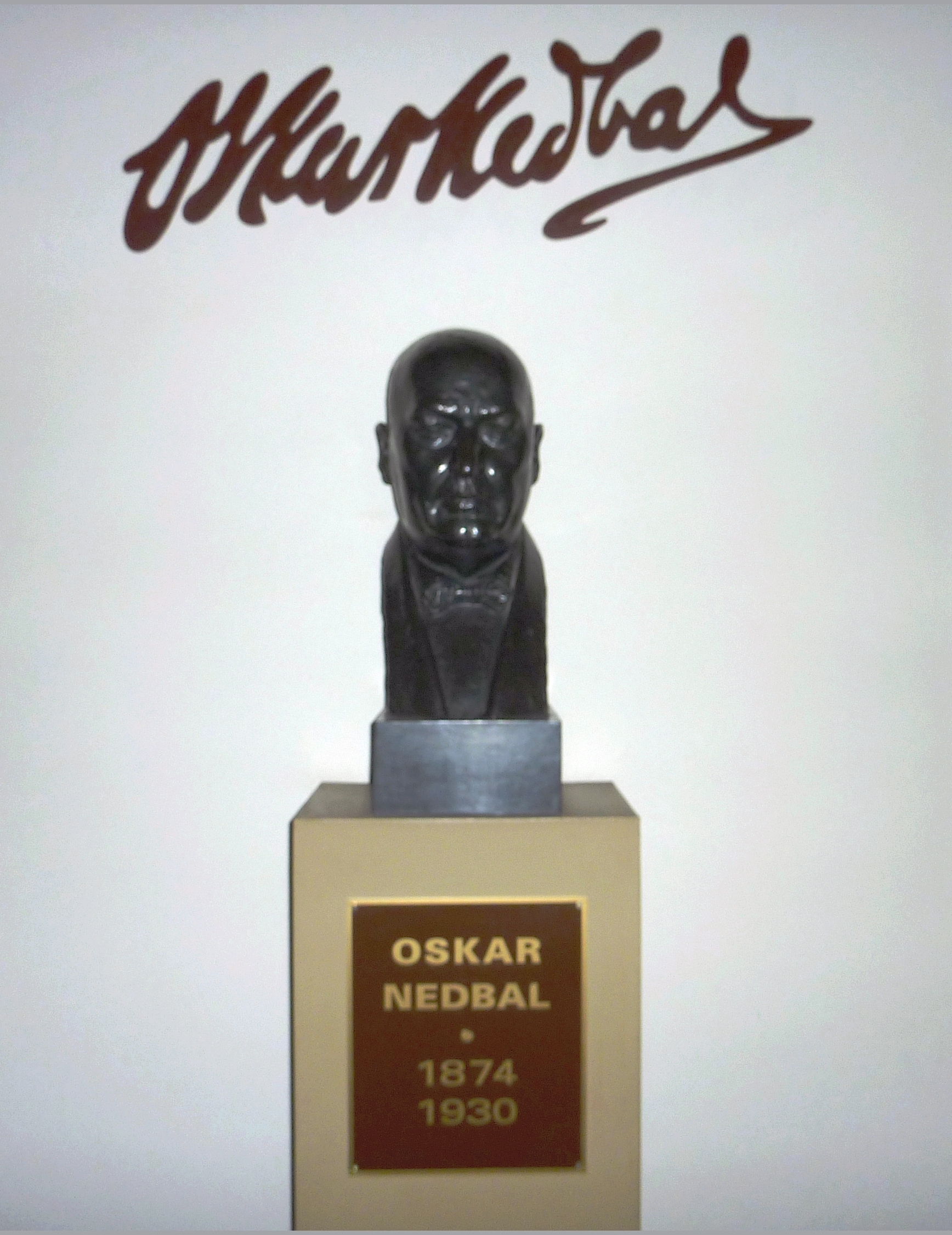 Busta Oskara Nedbala v Divadle Oskara Nedbala (DON) v Táboře - detail